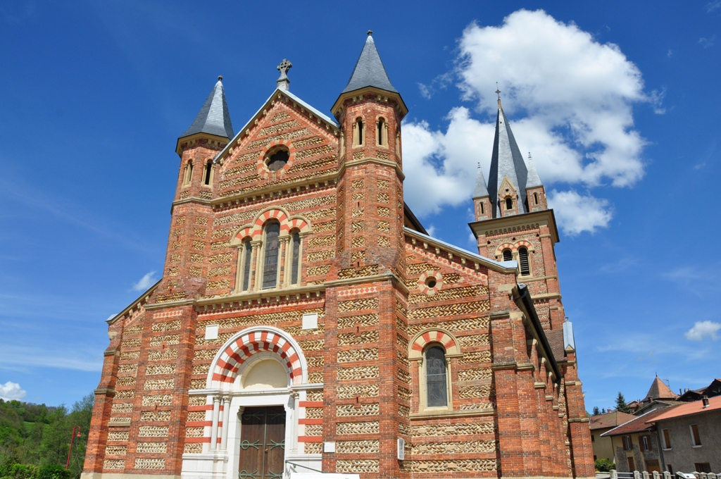 Eglise St Jean Baptiste de style néo-roman construite en 1878 en galets disposés en arête-de-poisson alternant avec des assises de brique.